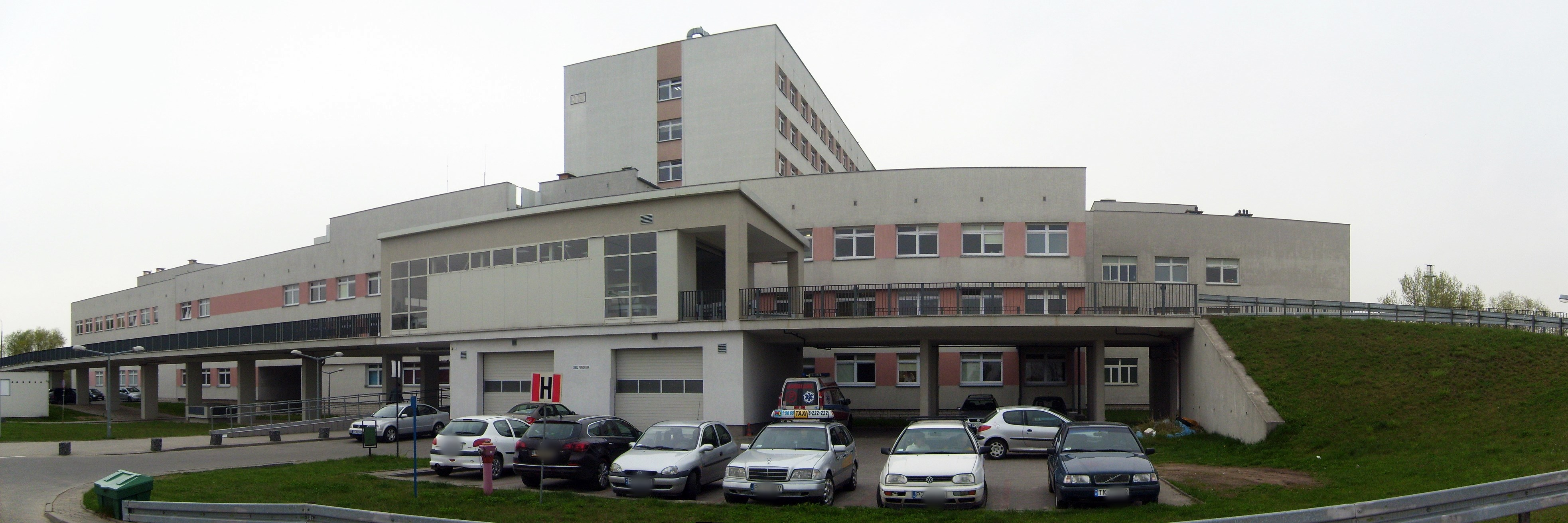 widok od strony lądowiska na SOR i podjazd do SOR